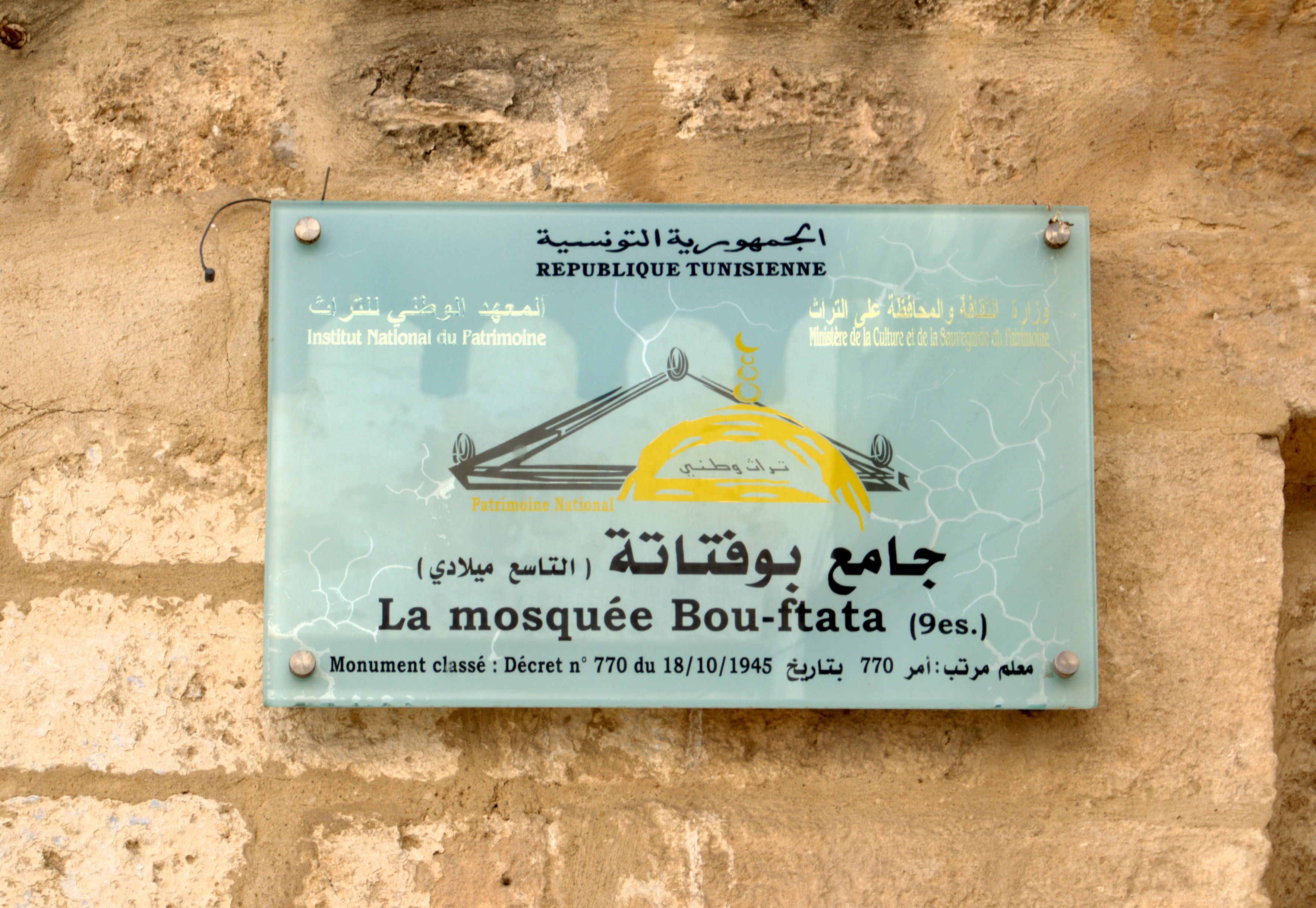 Mosquée Bou Ftetah, Sousse